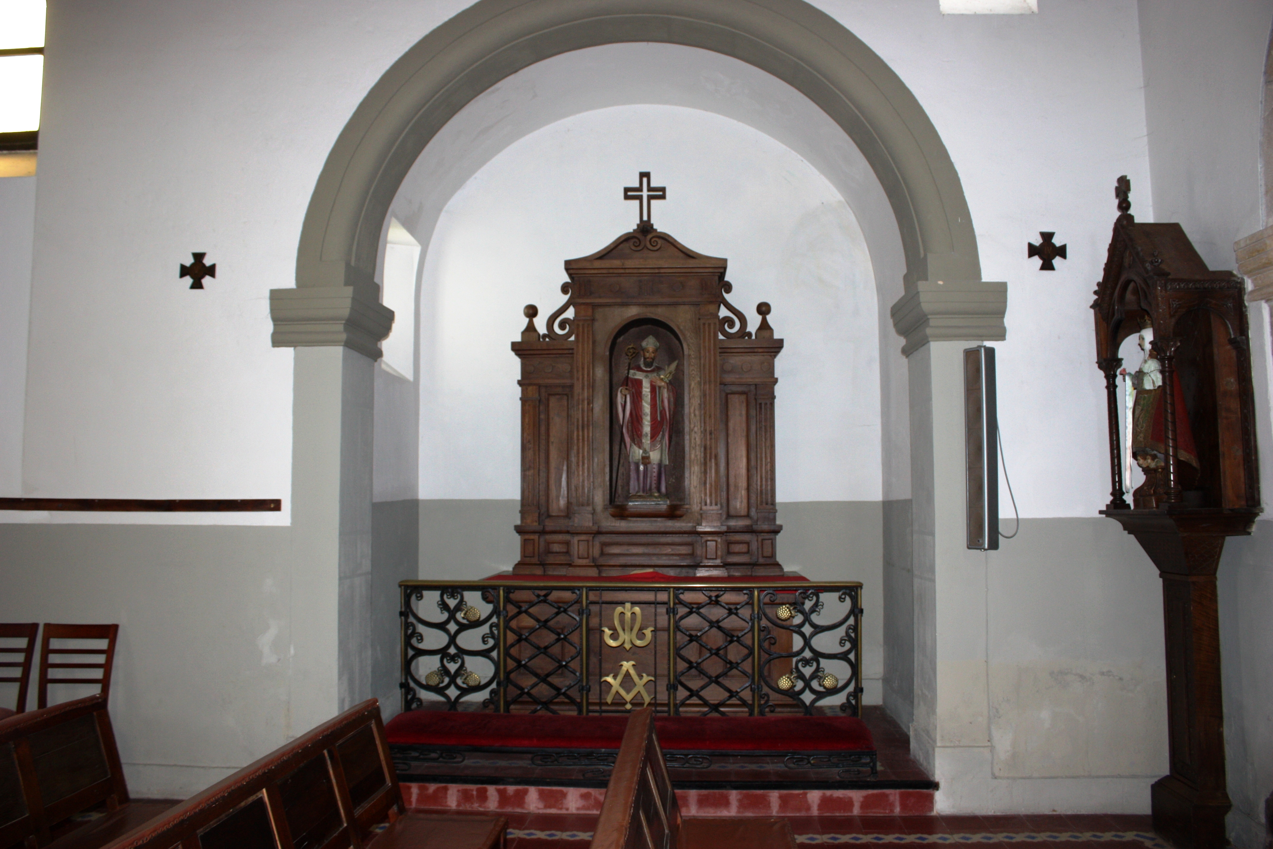 Santuario de Loreto en Colunga-Asturias